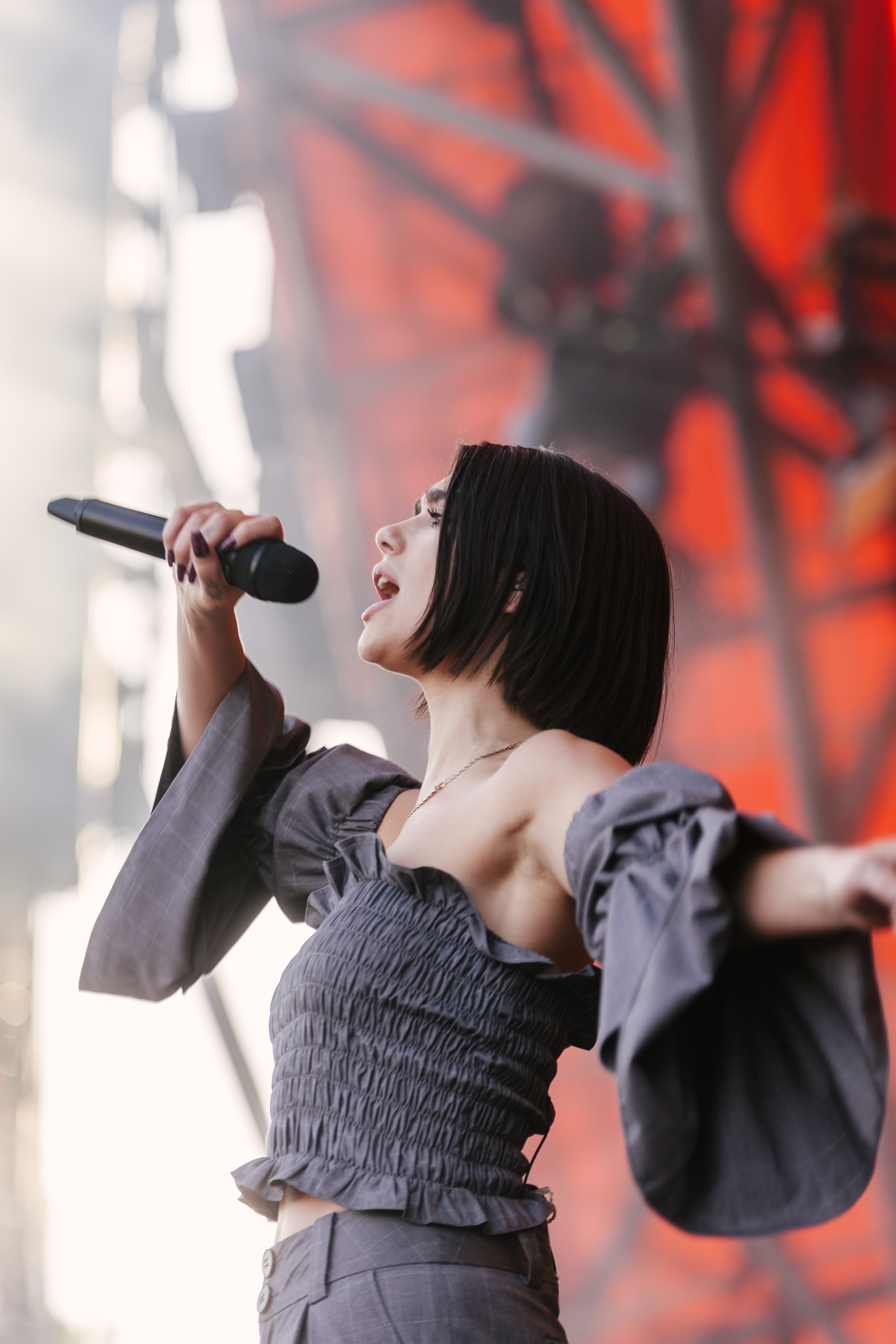 Festivalsommer This photo was created with the support of donations to Wikimedia Deutschland in the context of the CPB project "Festival Summer".